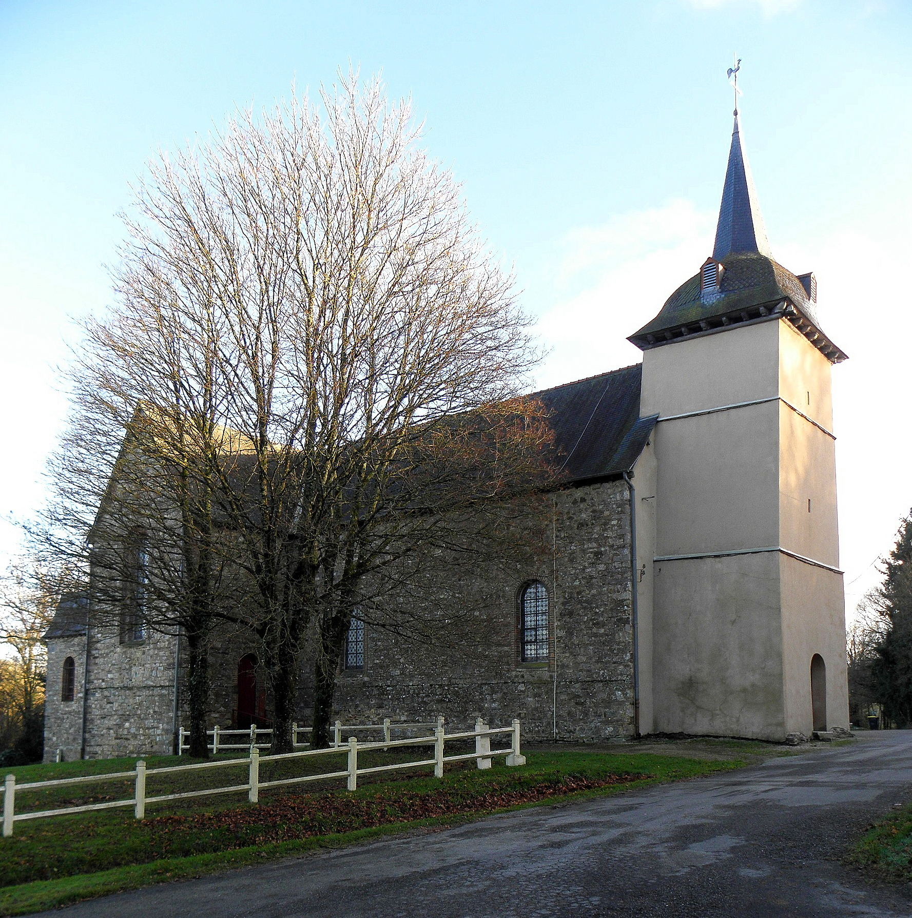 Église Notre-Dame de Bovel (35). Flanc nord.